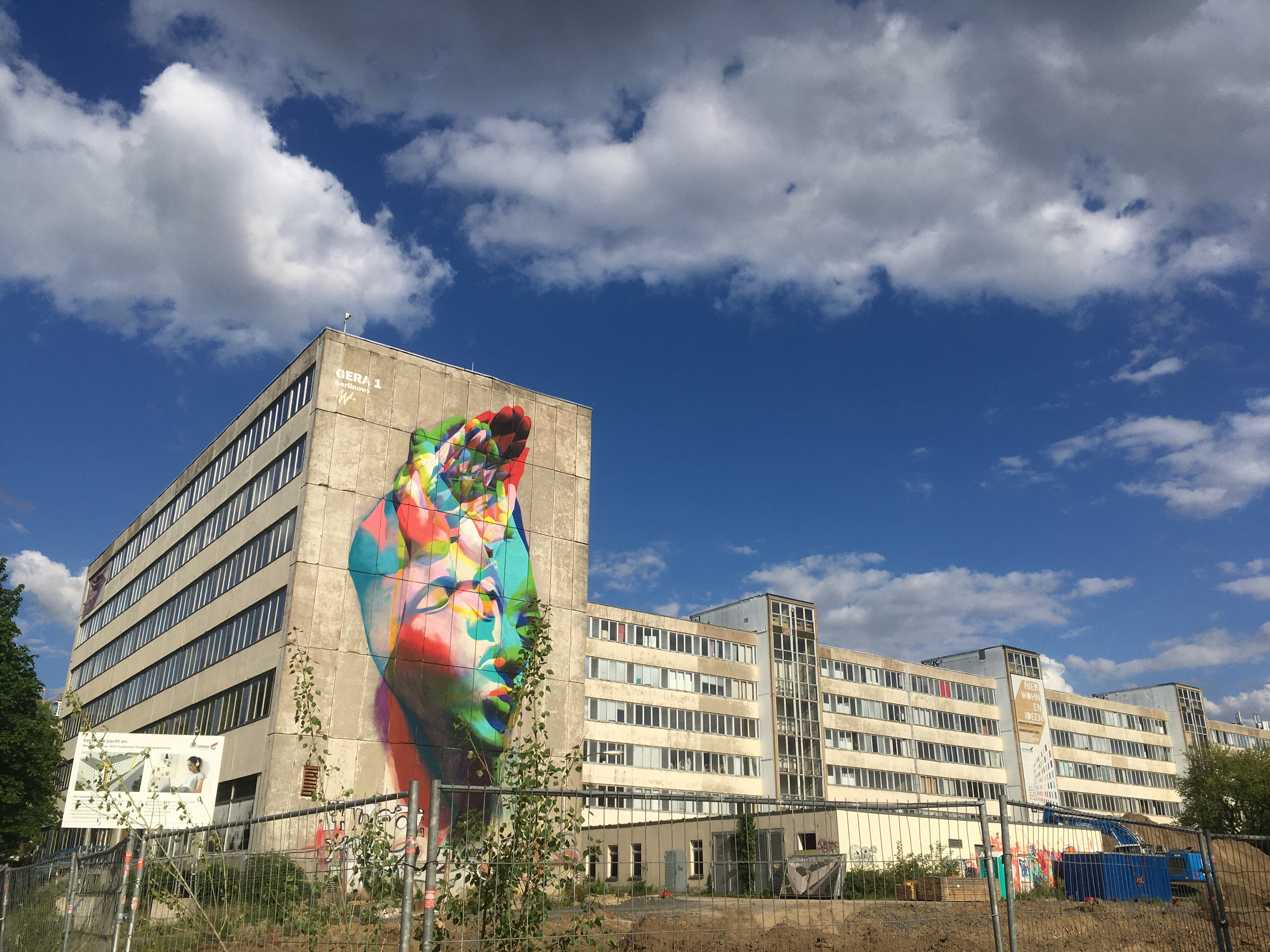 Gebäudekomplex Prenzlauer Promenade 149–152, als Hotel für diplomatische Vertretungen errichtet, ab 1983 Sitz der gesellschaftswissenschaftlichen Institute der Akademie der Wissenschaften der DDR, nach der Wende als Atelierhaus genutzt, seit 2019 im Bestand saniert; Mural von GERA 1